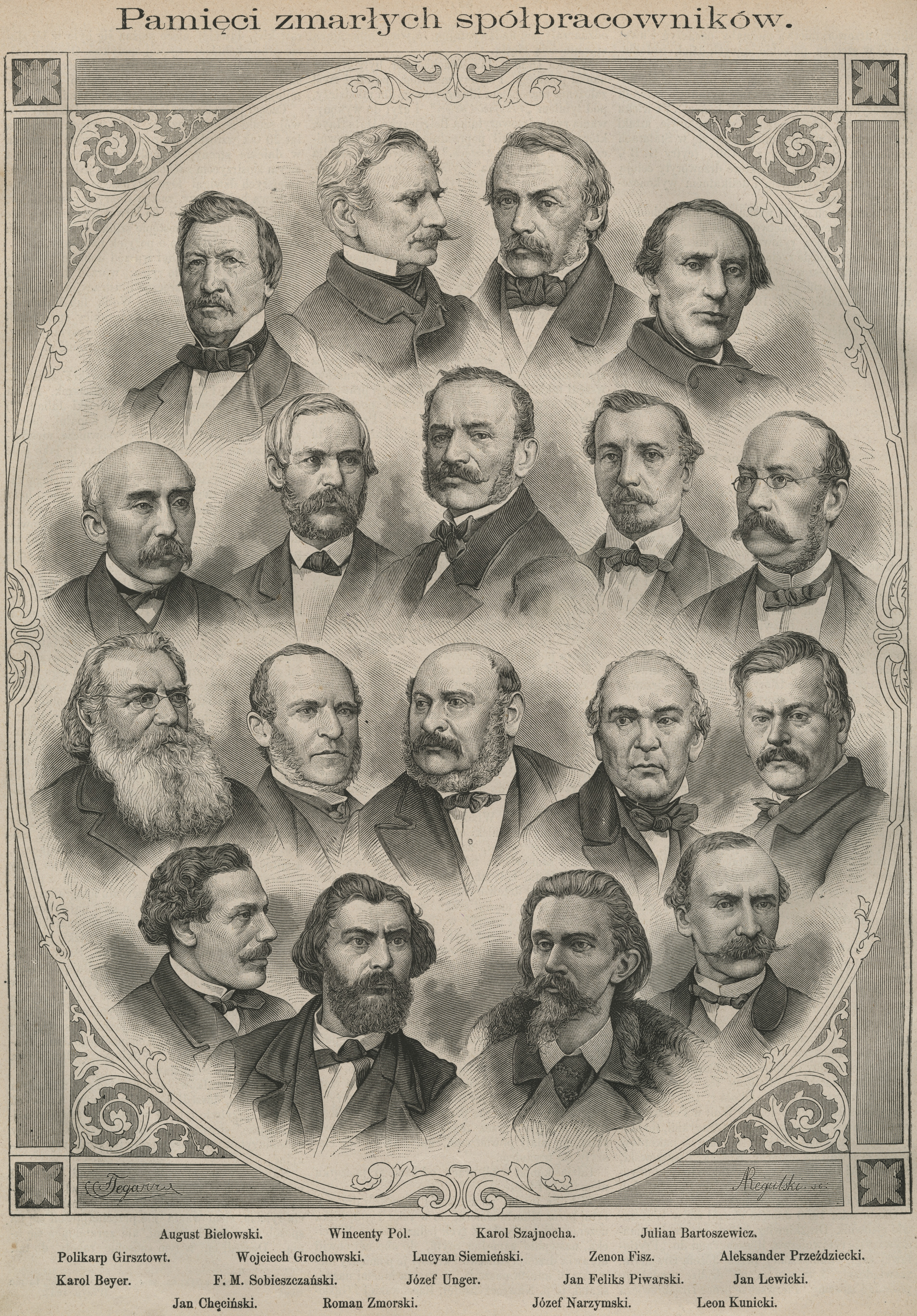 Pamięci zmarłych spółpracowników [...] [Tygodnika Illustrowanego]